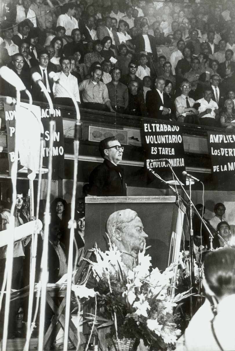 09/12/1971. Durante discurso en el 6º Congreso de la CUT